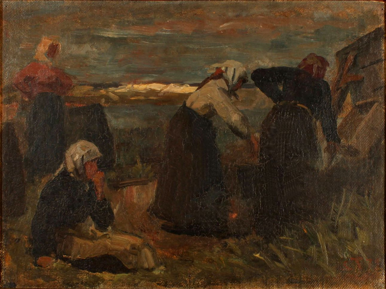 Trankogersker på stranden i bygevejr, Nymindegab.